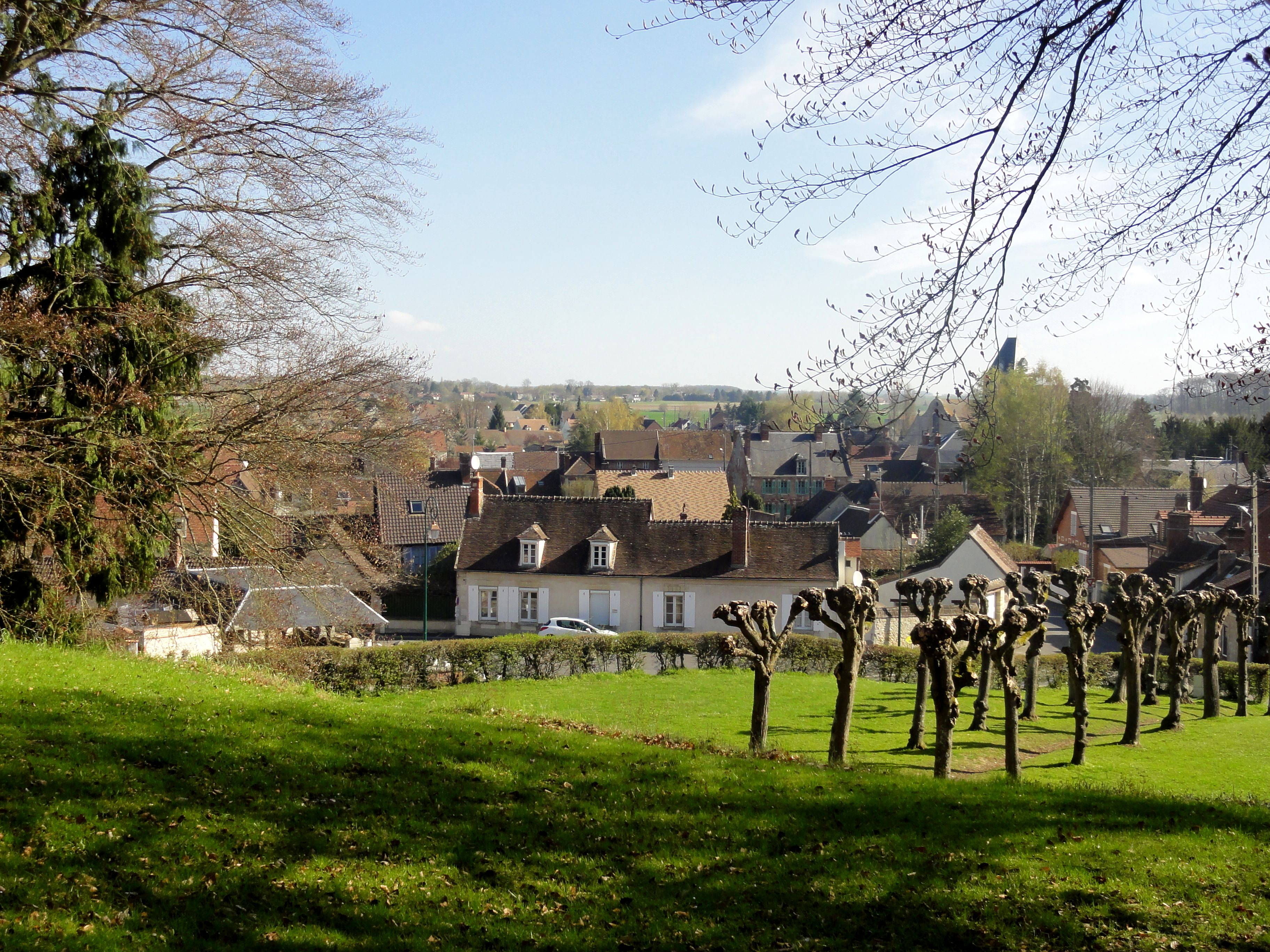 Vue sur le village depuis la statue de Saint-Louis, au sud.